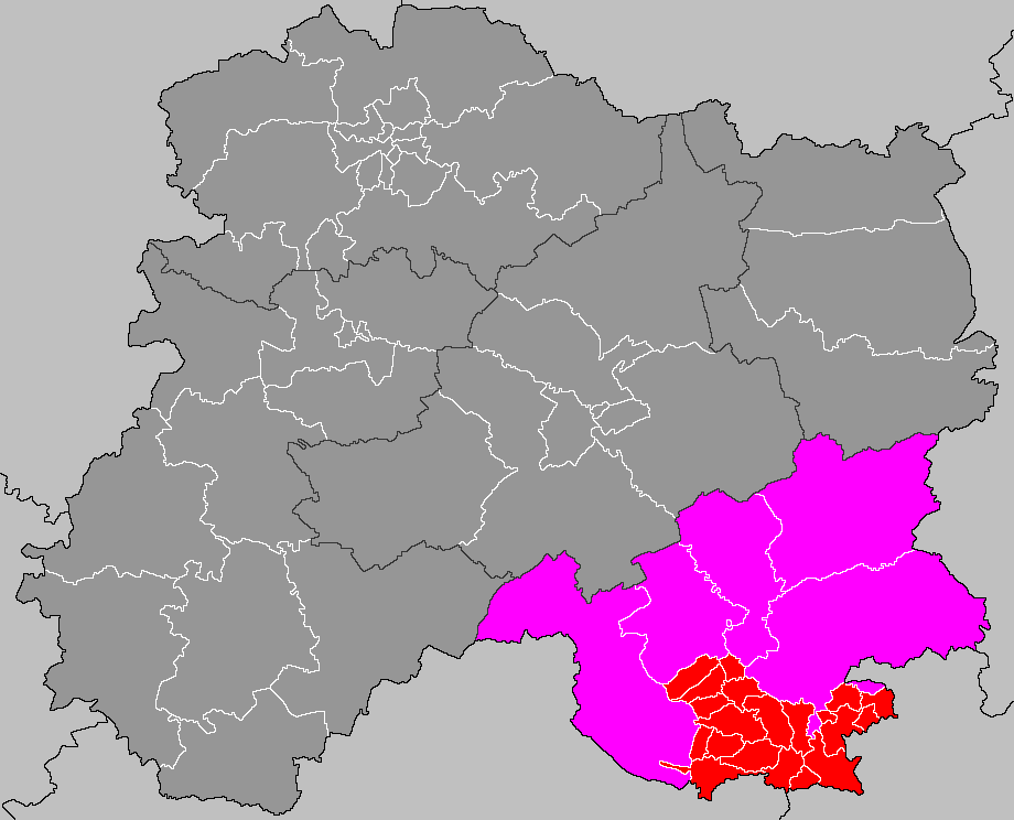 Localisation du canton de Saint-Remy-en-Bouzemont-Saint-Genest-et-Isson